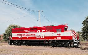 Train of WSOR